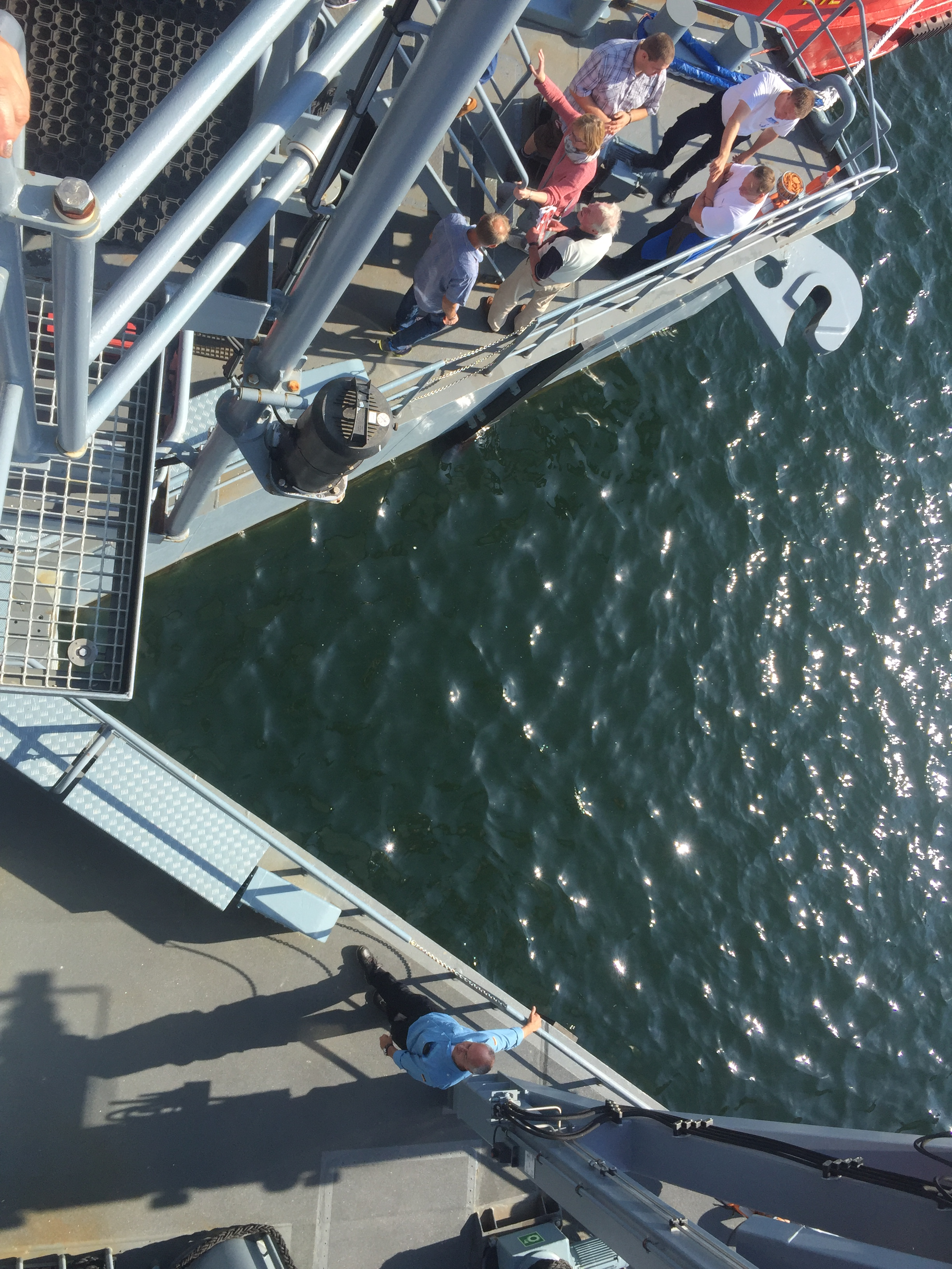 Ölauffangschiff Bottsand - Draufsicht aufgeklappter Auffangbereich